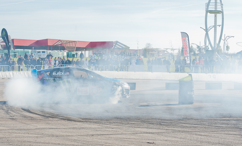 Gymkhana madrid 2013